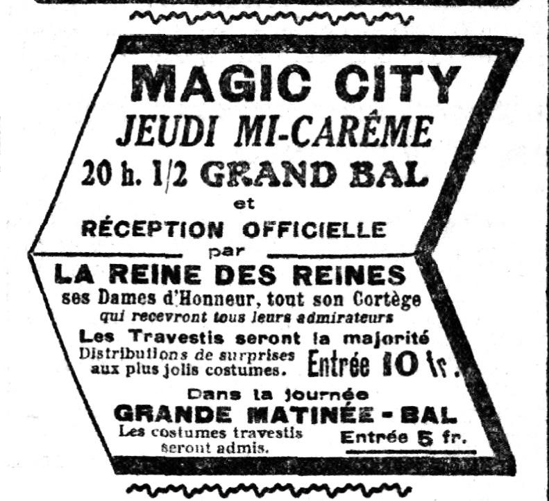 Annonce du bal de la Mi-Carême 1920 à Magic City.